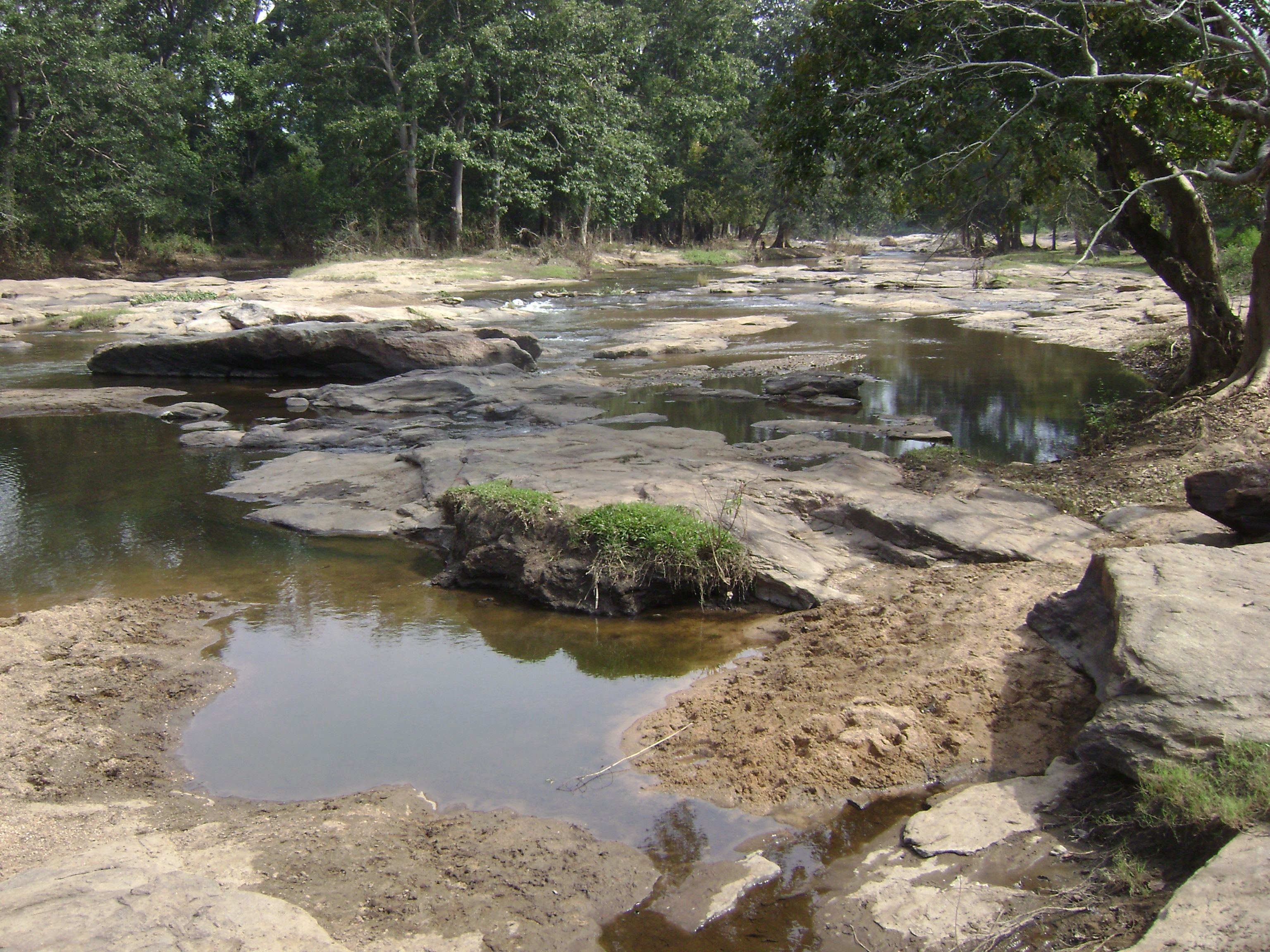 Rever Ten Ar at Talinji